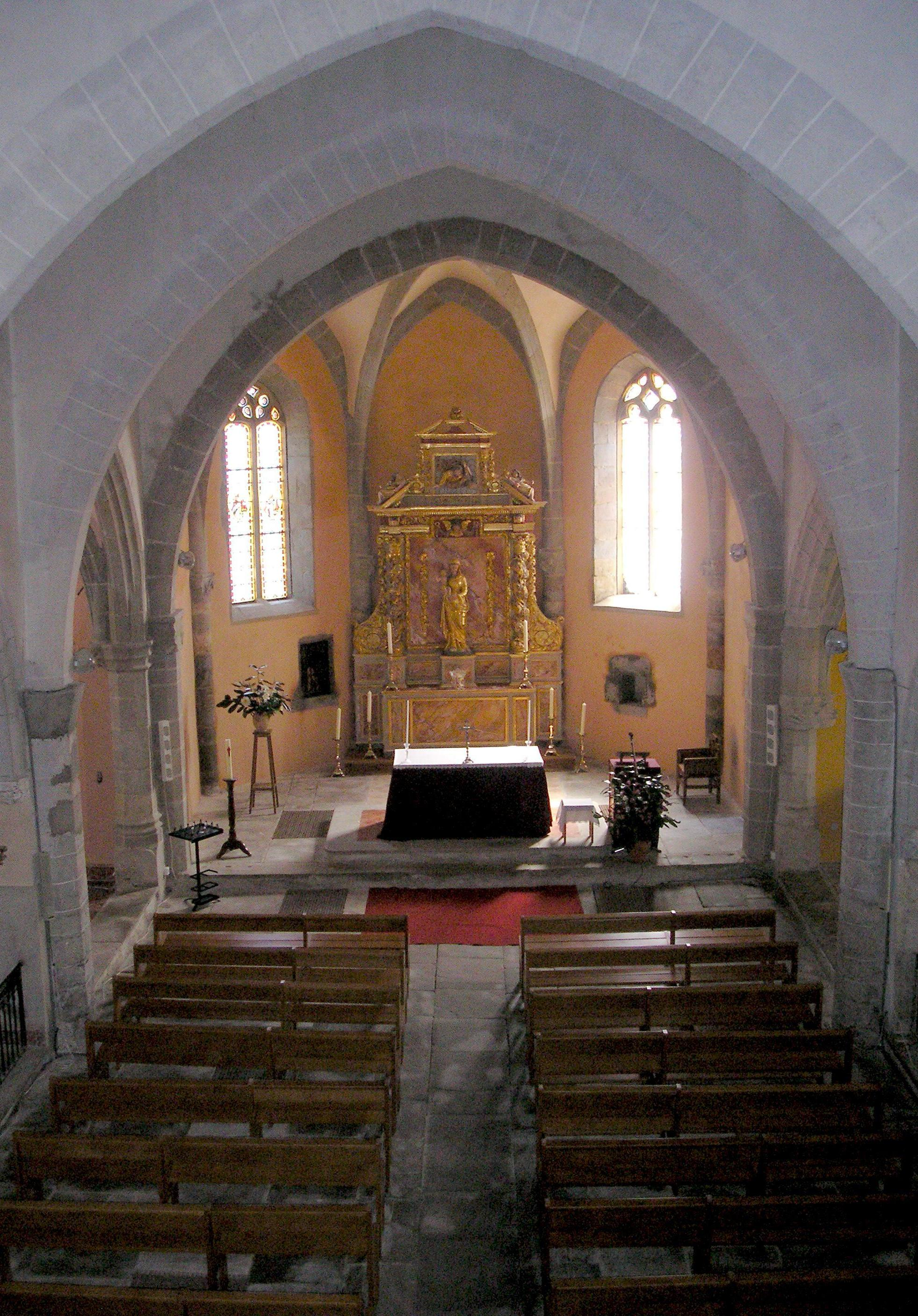 La nef de l'église Saint Clément à Fontiers-Cabardès vue de la tribune.